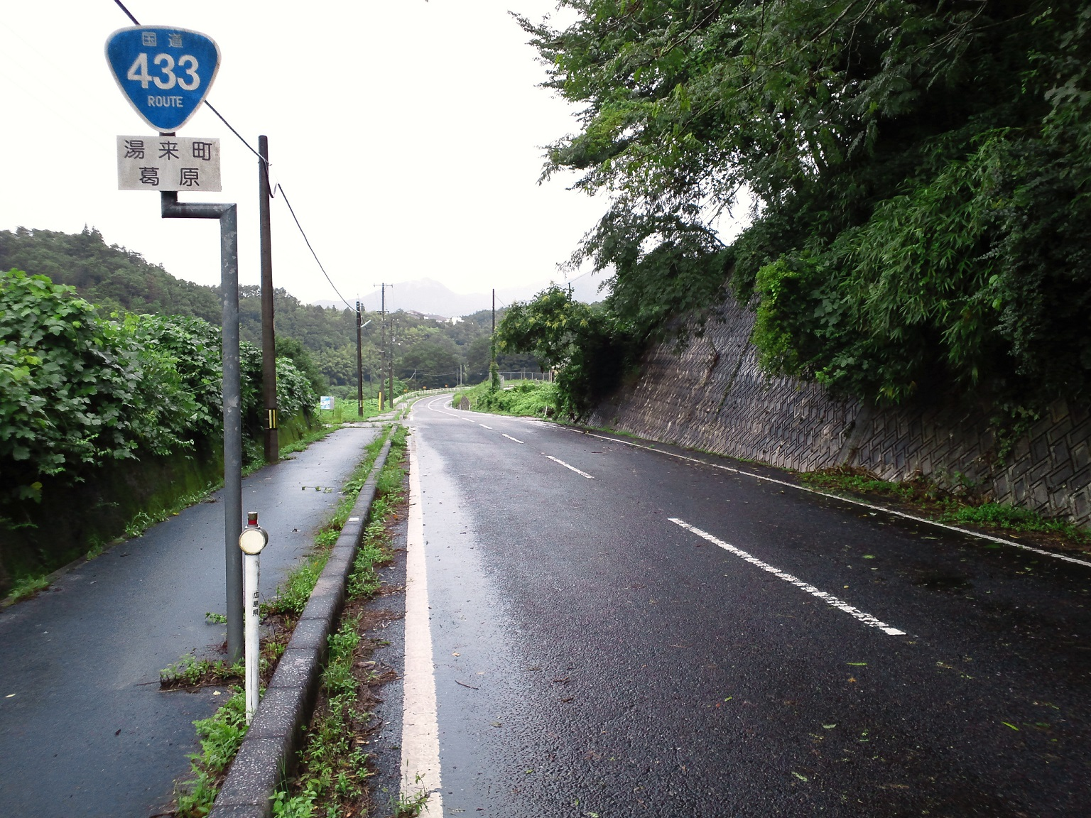 広島市佐伯区湯来町葛原付近の国道433号。